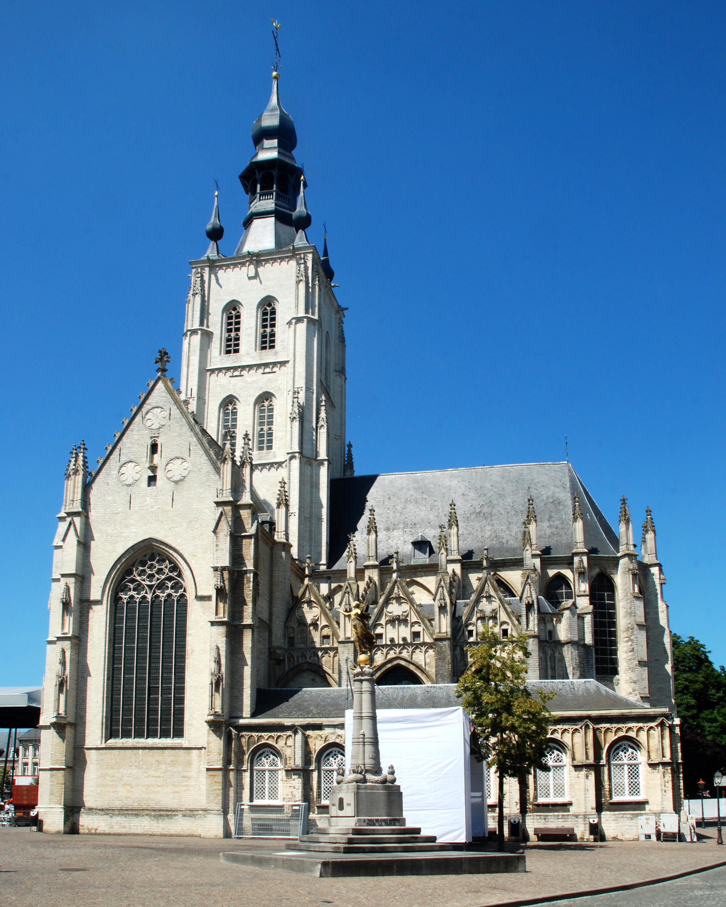 Belgique - Brabant flamand - Tirlemont - Église Notre-Dame-au-Lac